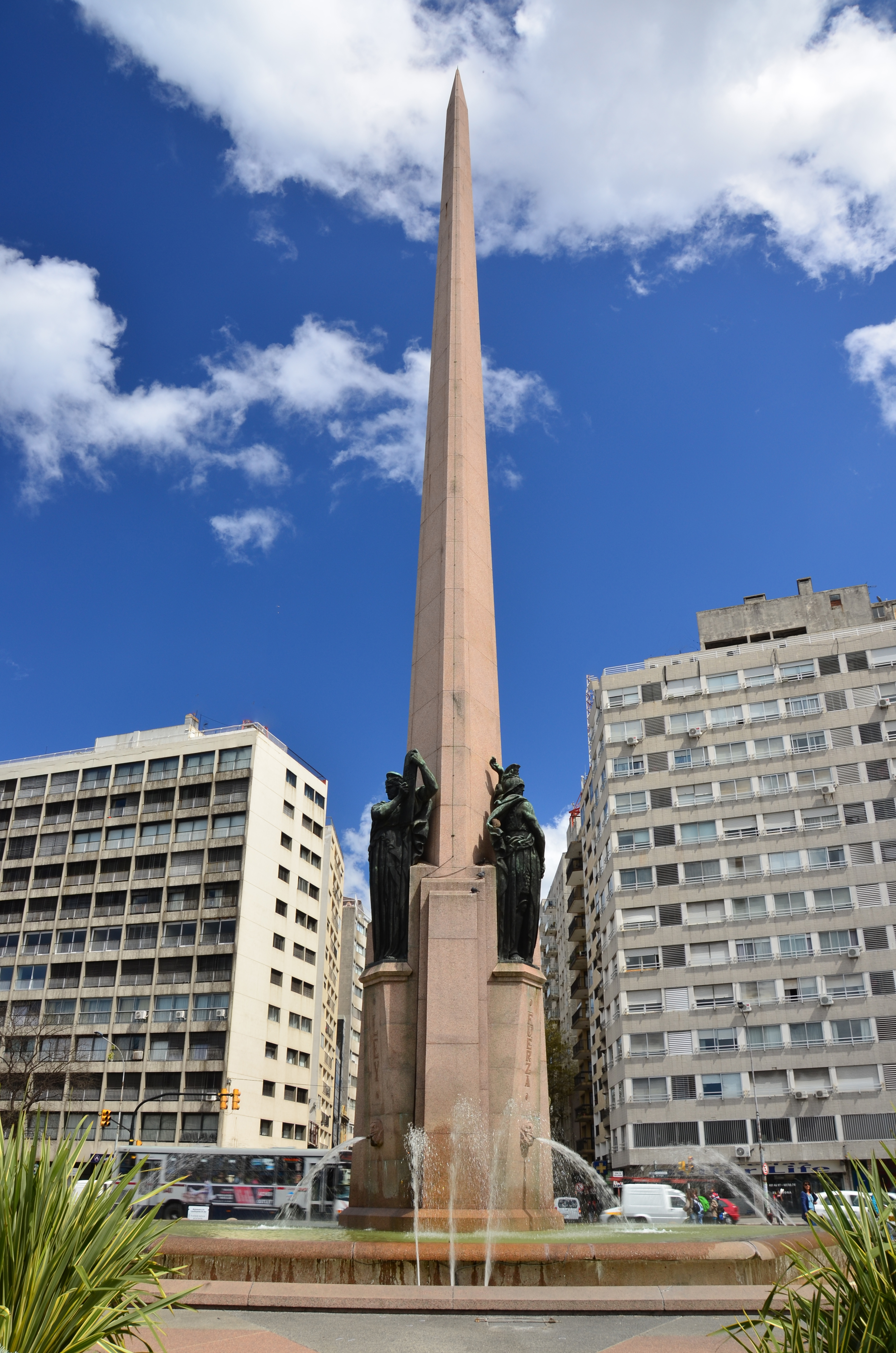 Obelisco a los Constituyentes de 1830. Ubicada en el departamento de Montevideo